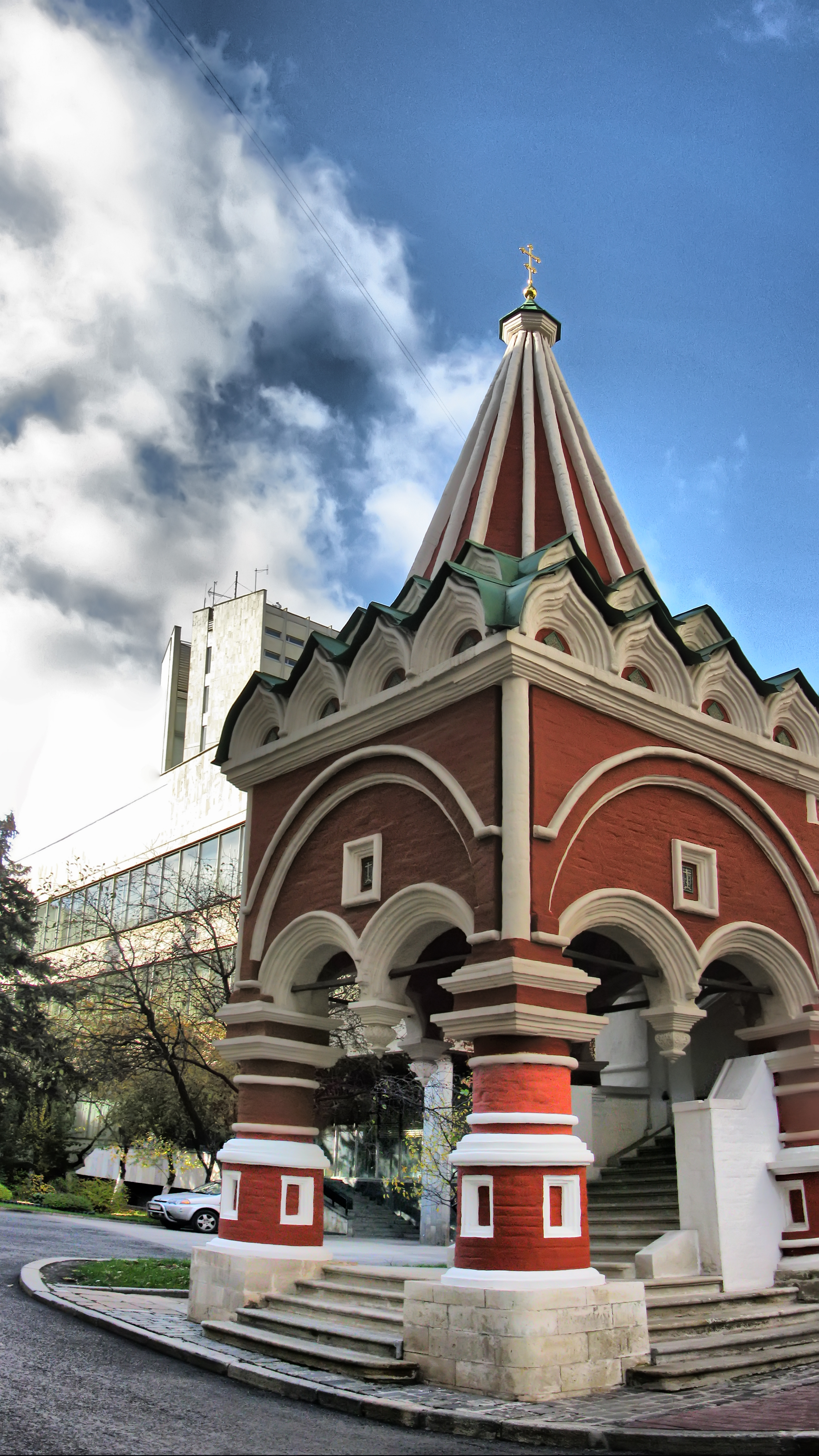 Китай-город